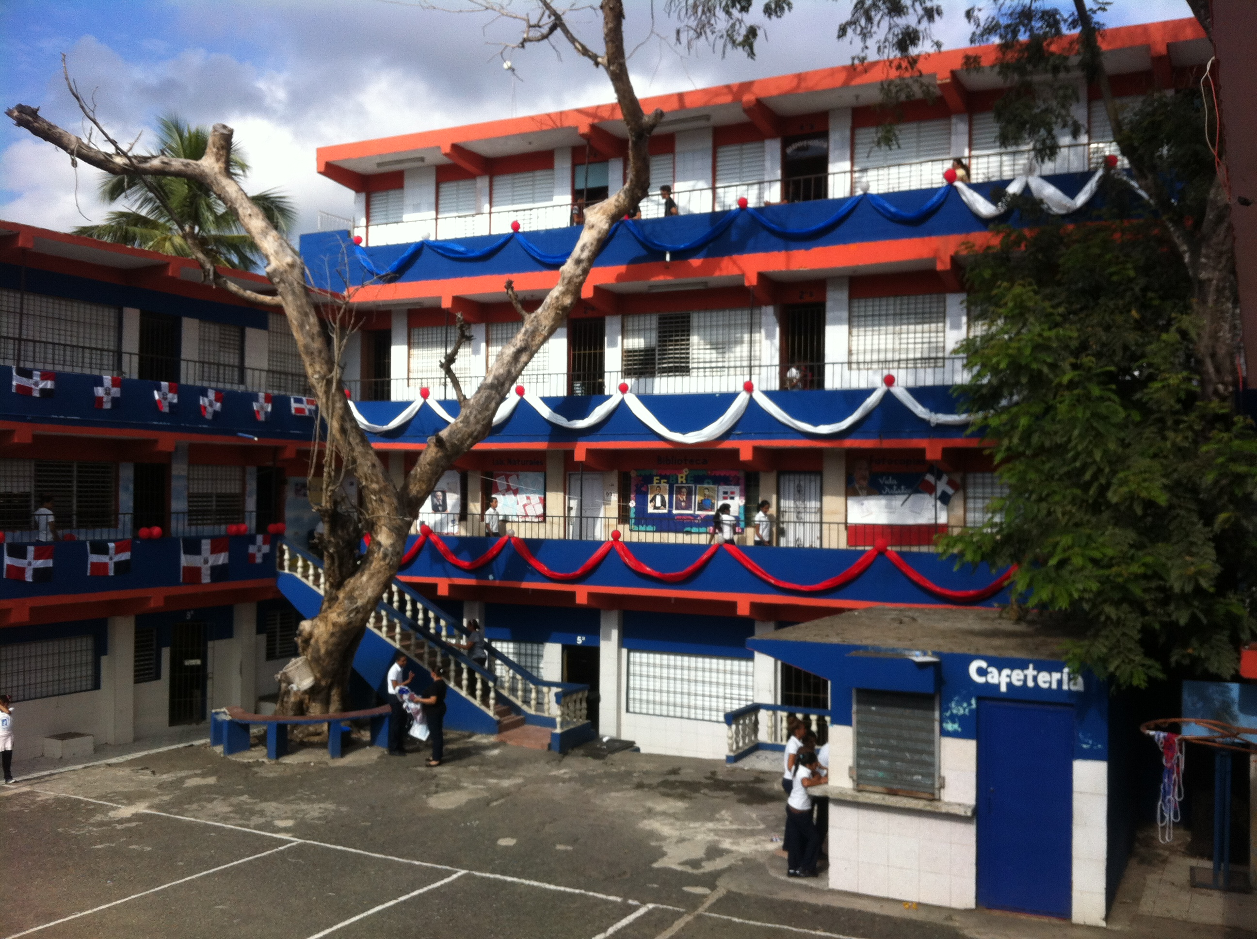 Otra parte del Colegio Gustavo Adolfo Bécquer en los Alcarrizos